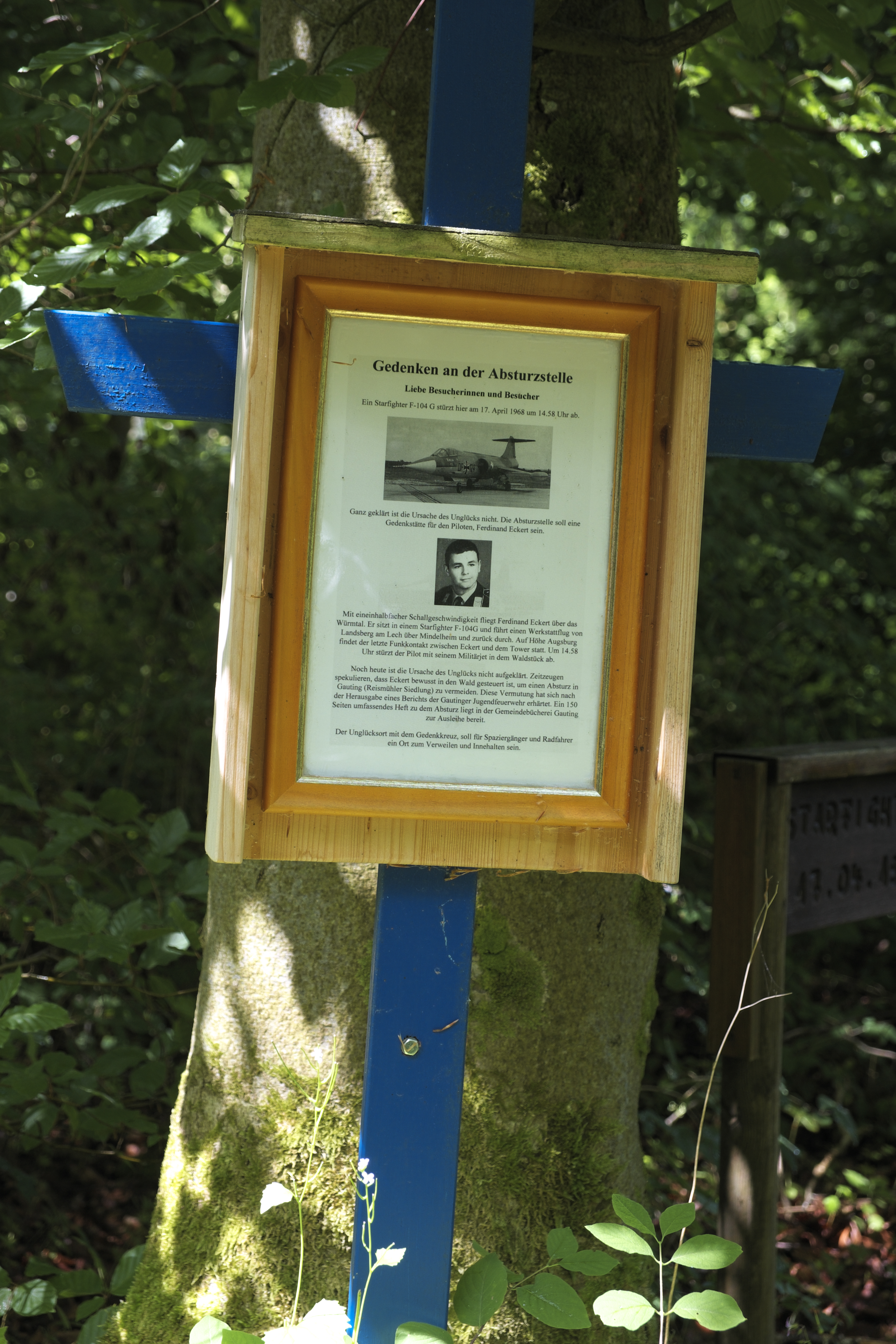 Kreuz und Gedenktafel an der Absturzstelle eines Starfighters in der Nähe der Filialkirche St. Ulrich in Königswiesen (Gauting)